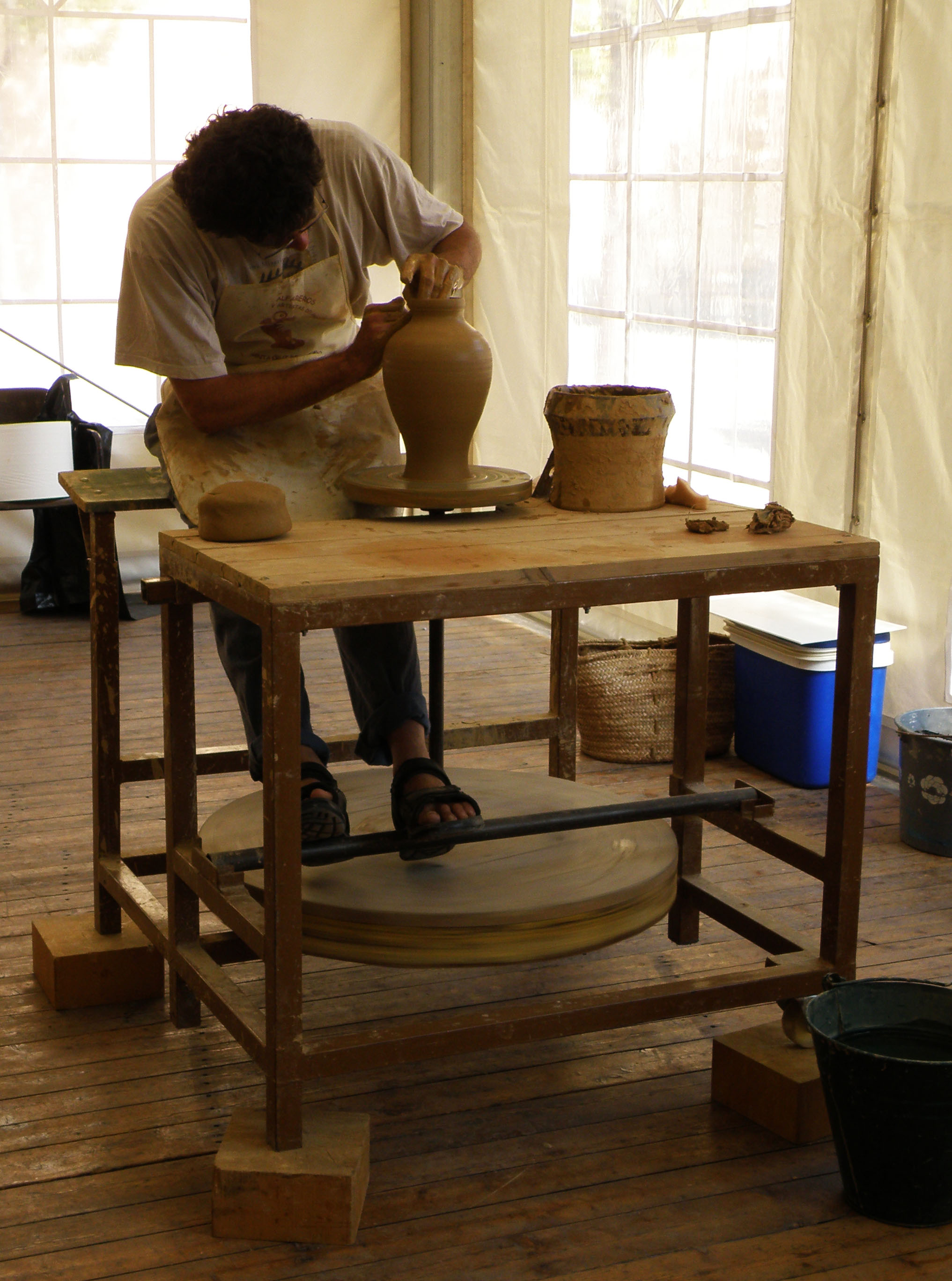 Un artesà ceramista en la fira "Terrània 2011" de Montblac, Conca de Barberà, Tarragona.